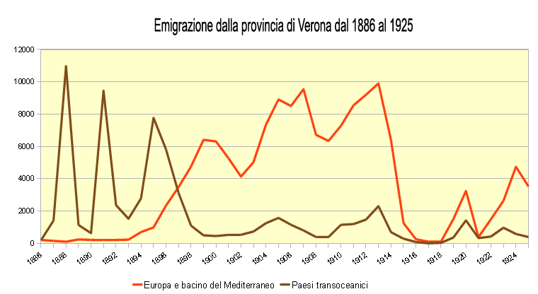 Il grafico evidenzia l'emigrazione dalla provincia di Verona tra il 1886 al 1925 verso altri paesi europei e in paesi transoceanici. I dati sono presi dall'allegato al giornale L'Arena per i 140° dalla fondazione.